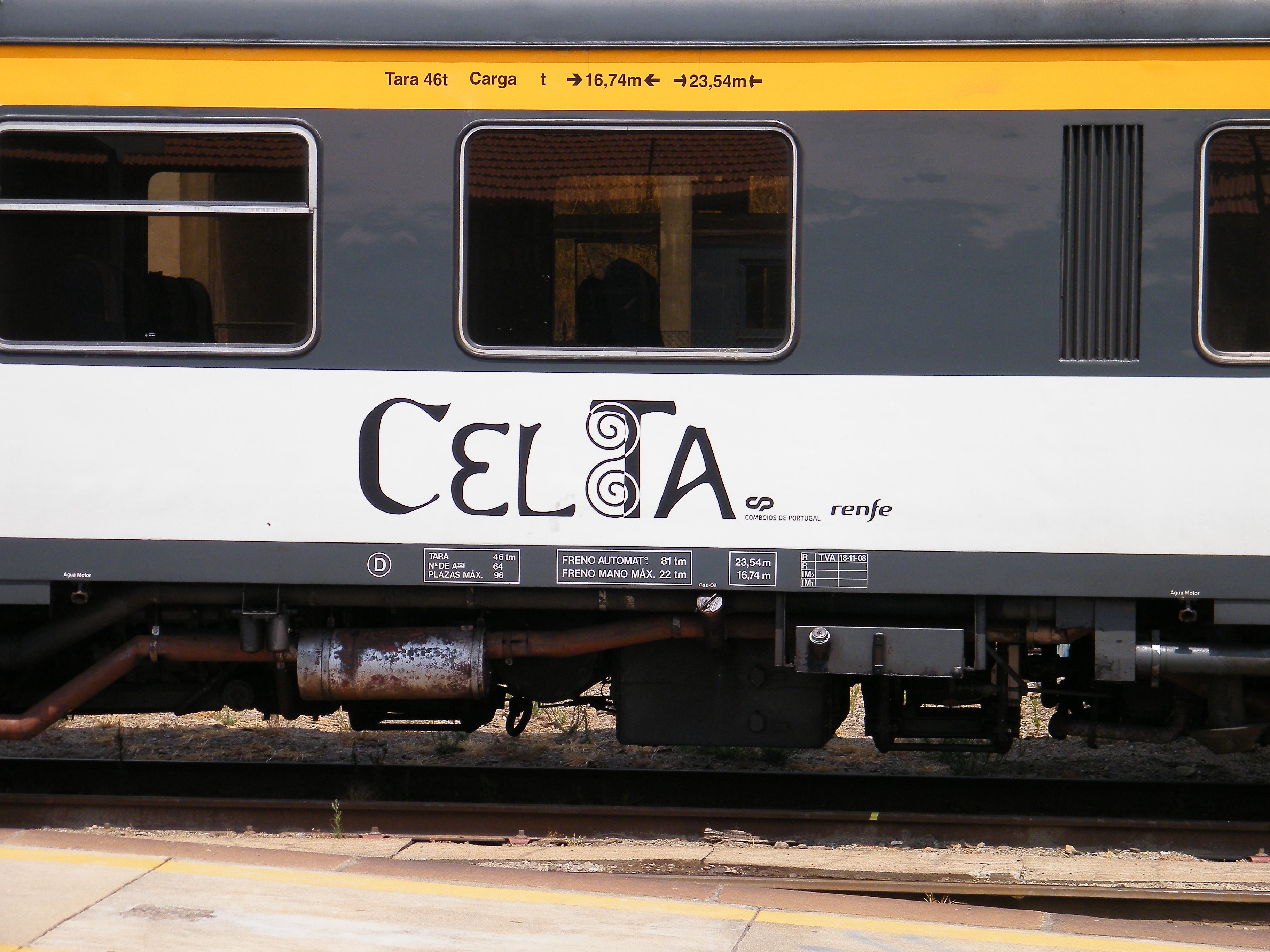 Lettering “Celta” da UTD 592-002 Hora: 14:16 Data: 17-07-2013 Local: Estação da Régua (PK 103 - Linha do Douro)